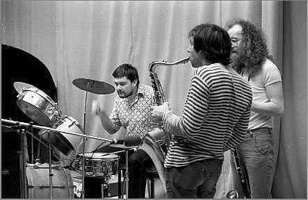 Запись нового альбома: ДК - 1985